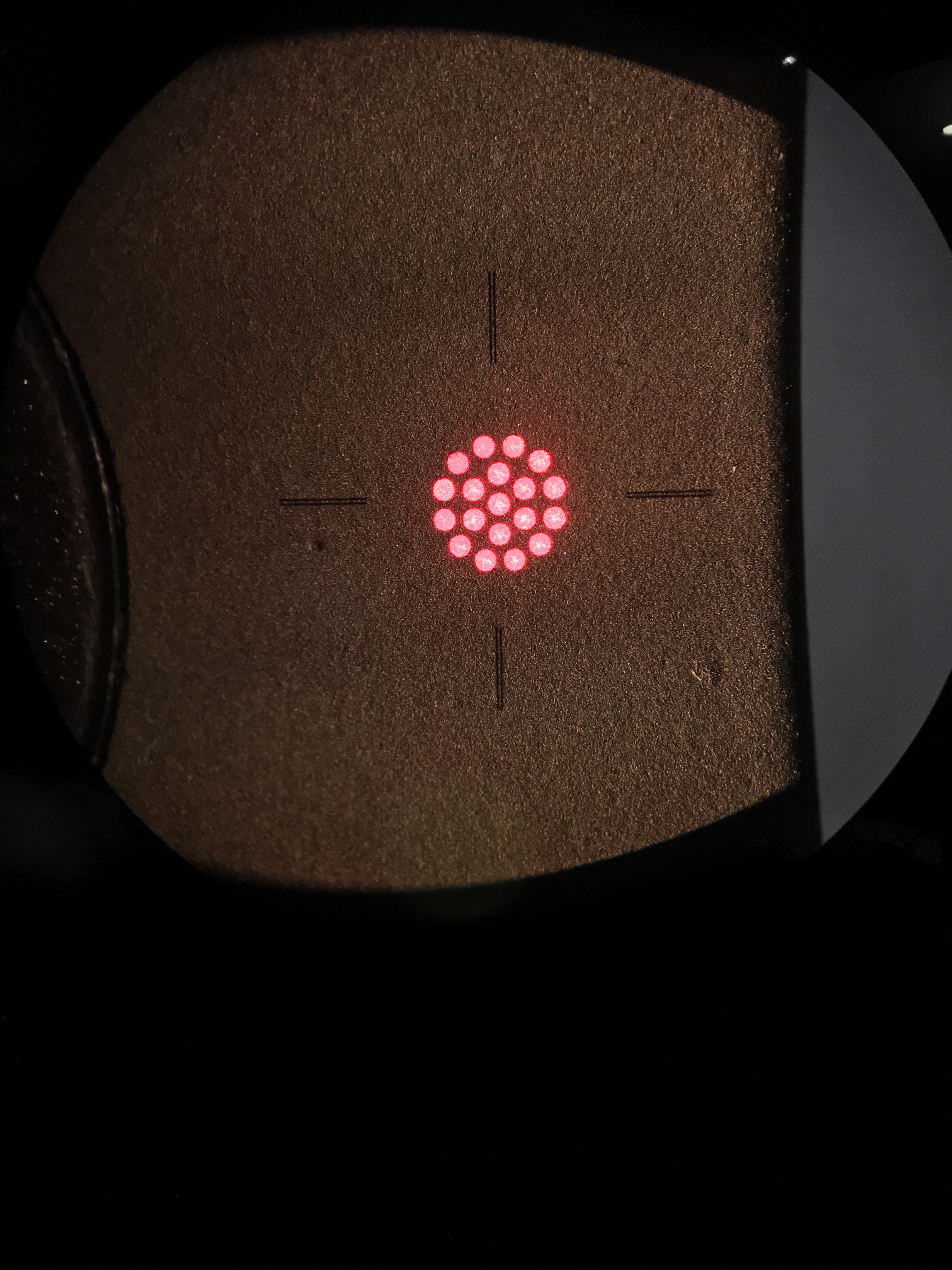 Пример шаблона, используемого при лазерной коагуляции сетчатки с использованием технологии паттерн-сканирования